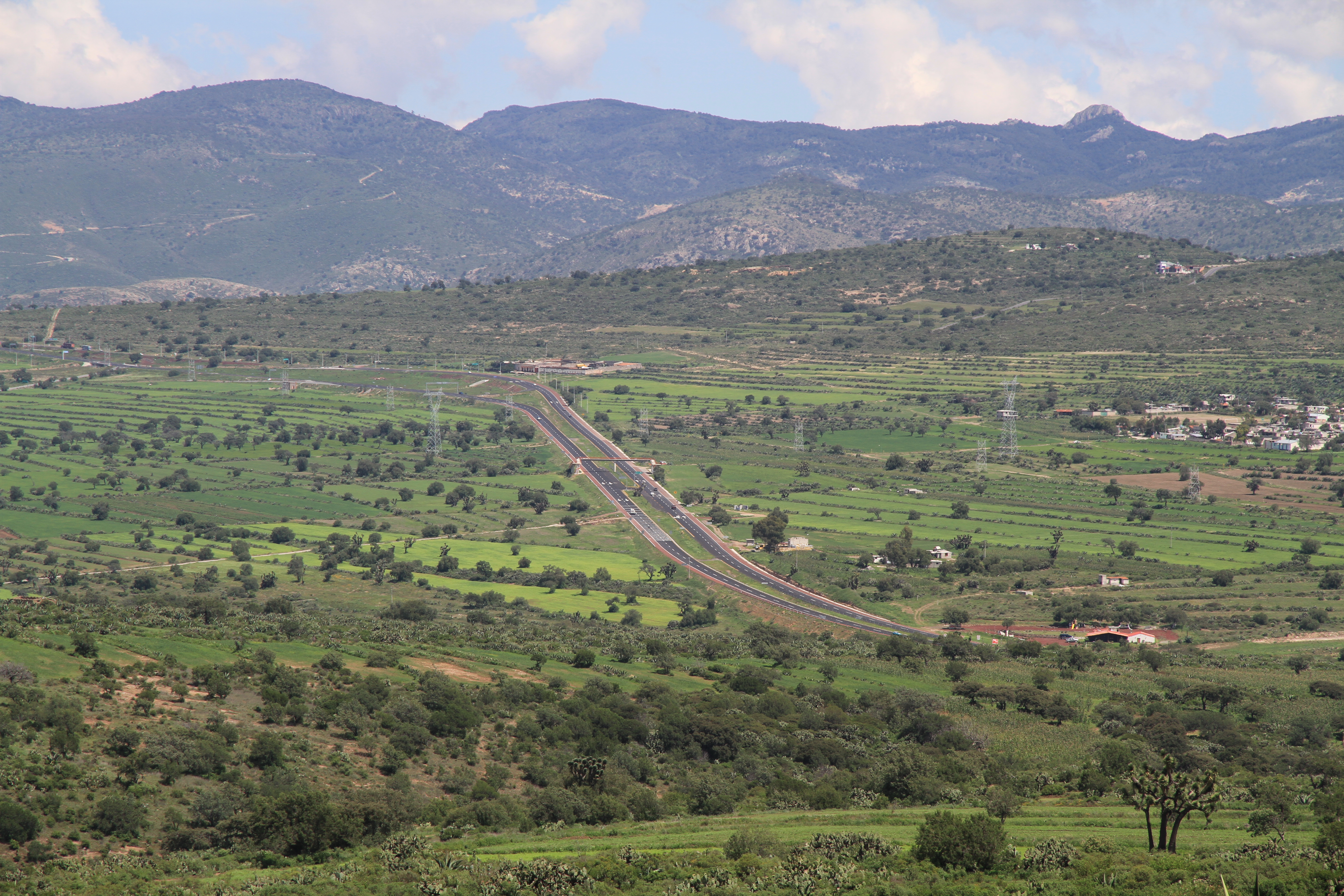 Autopista Pachuca-Tulancingo